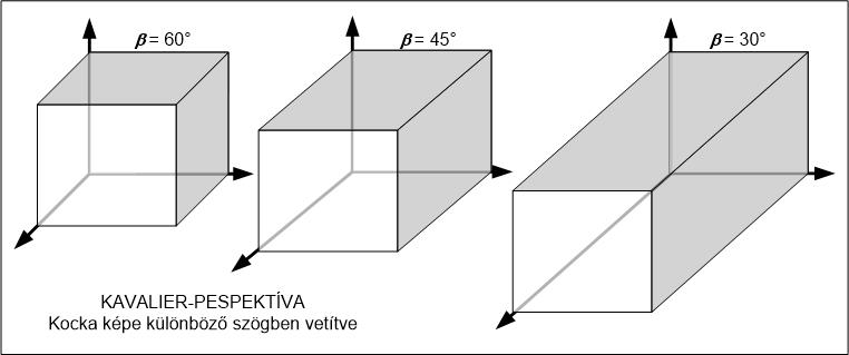 Vetületek különböző szögben